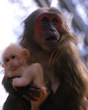 Macaque ours. Une femelle et son nouveau-né. Photographie de Bernard Thierry avec son aimable autorisation.